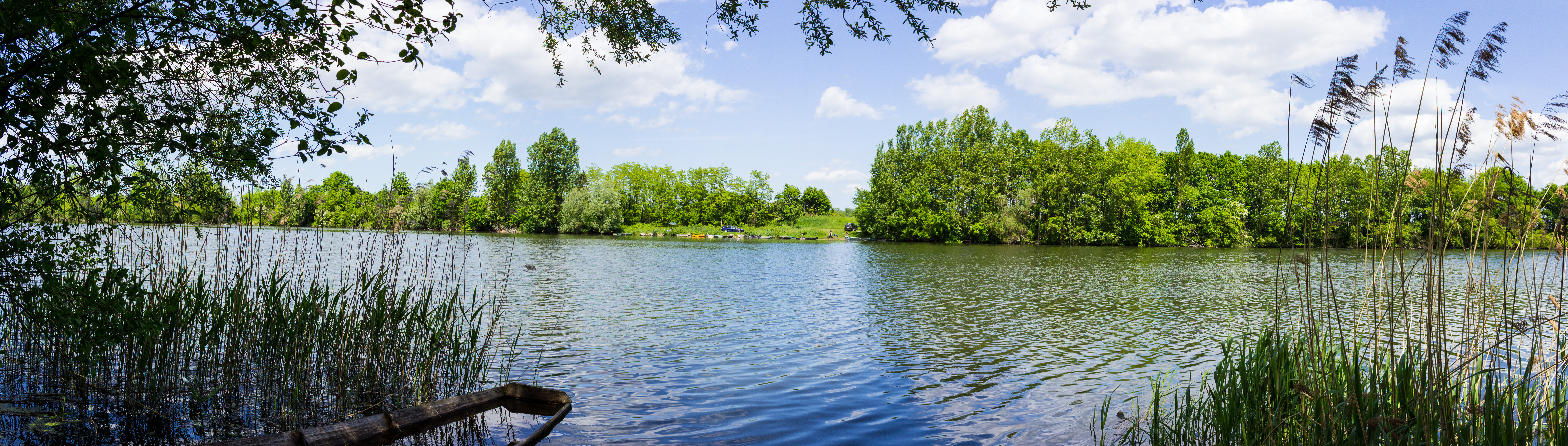 Das Bild wurde am Altrhein bei Russheim aufgenommen in der Nähe vom Baggersee Brecht